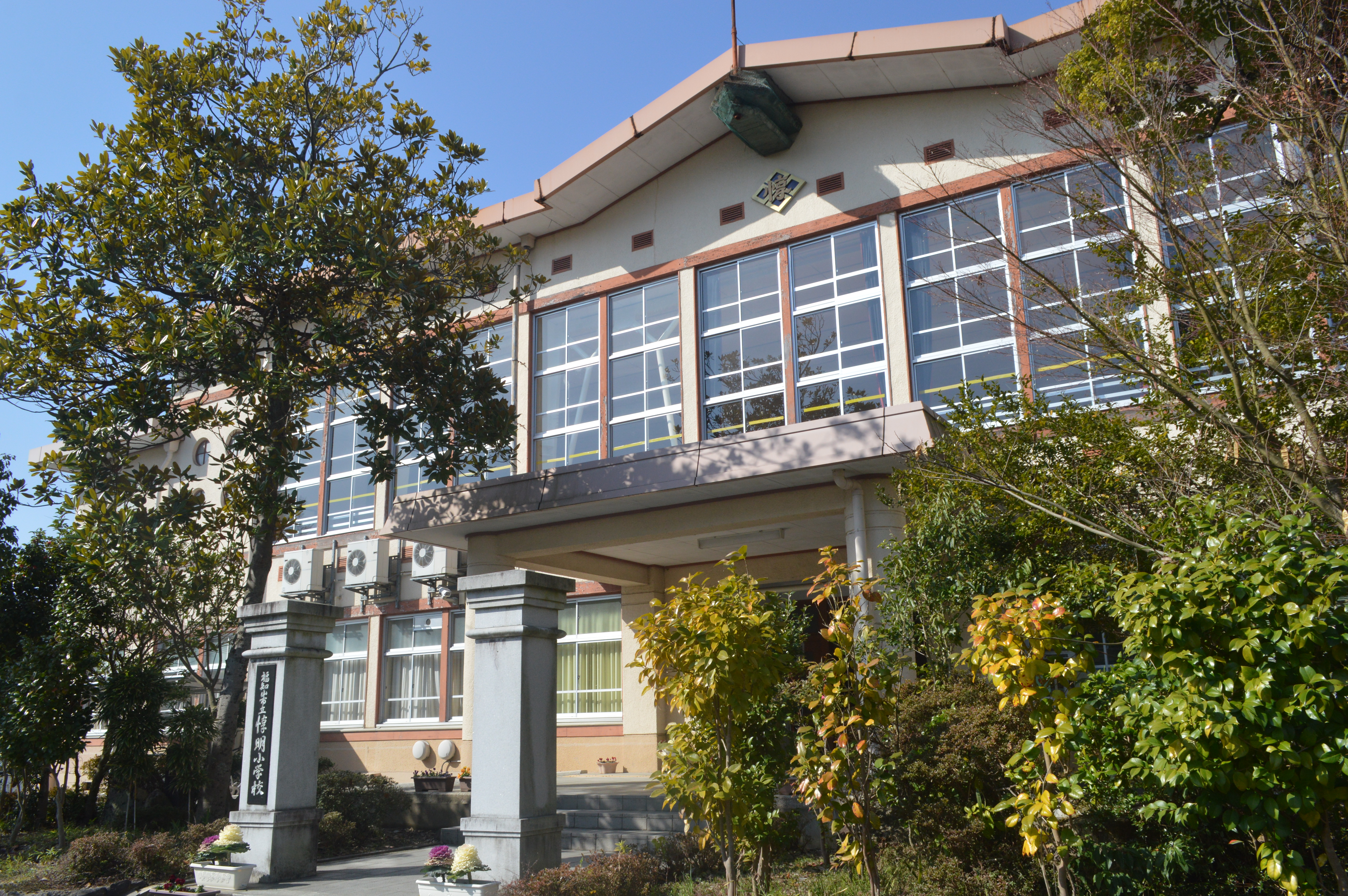 京都府福知山市字内記21にある福知山市立惇明小学校。